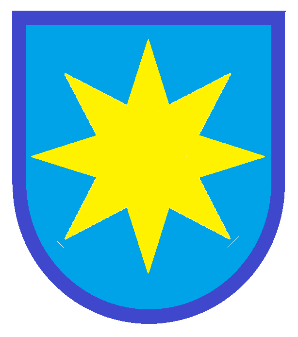 Герб роду Полозів